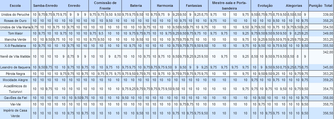 Resultados do Carnaval de São Paulo - 2009